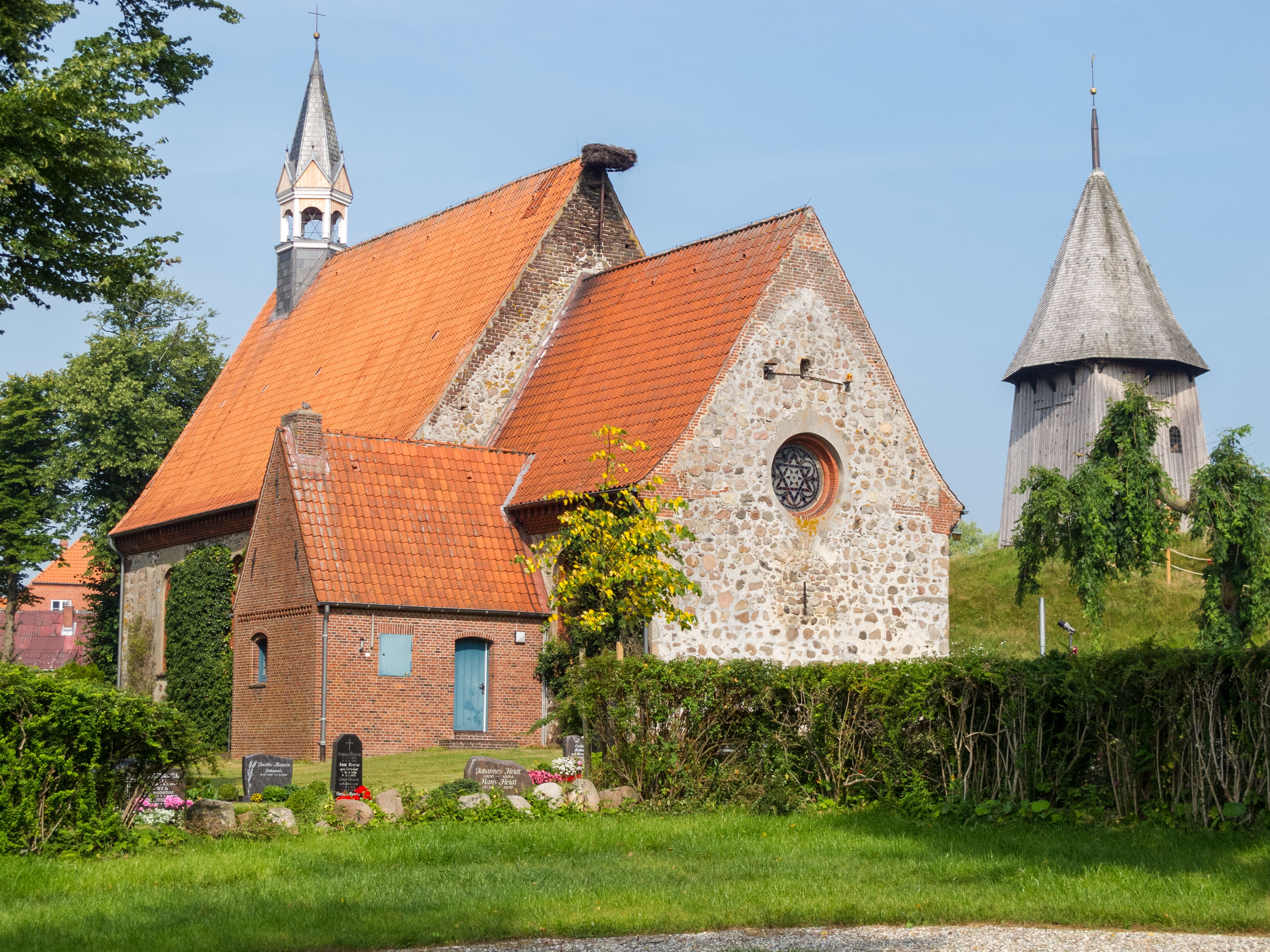 Schwabstedt, Ldkrs. Nordfriesland: Kirche St. Jakobi mit freistehendem hölzernen Glockenturm